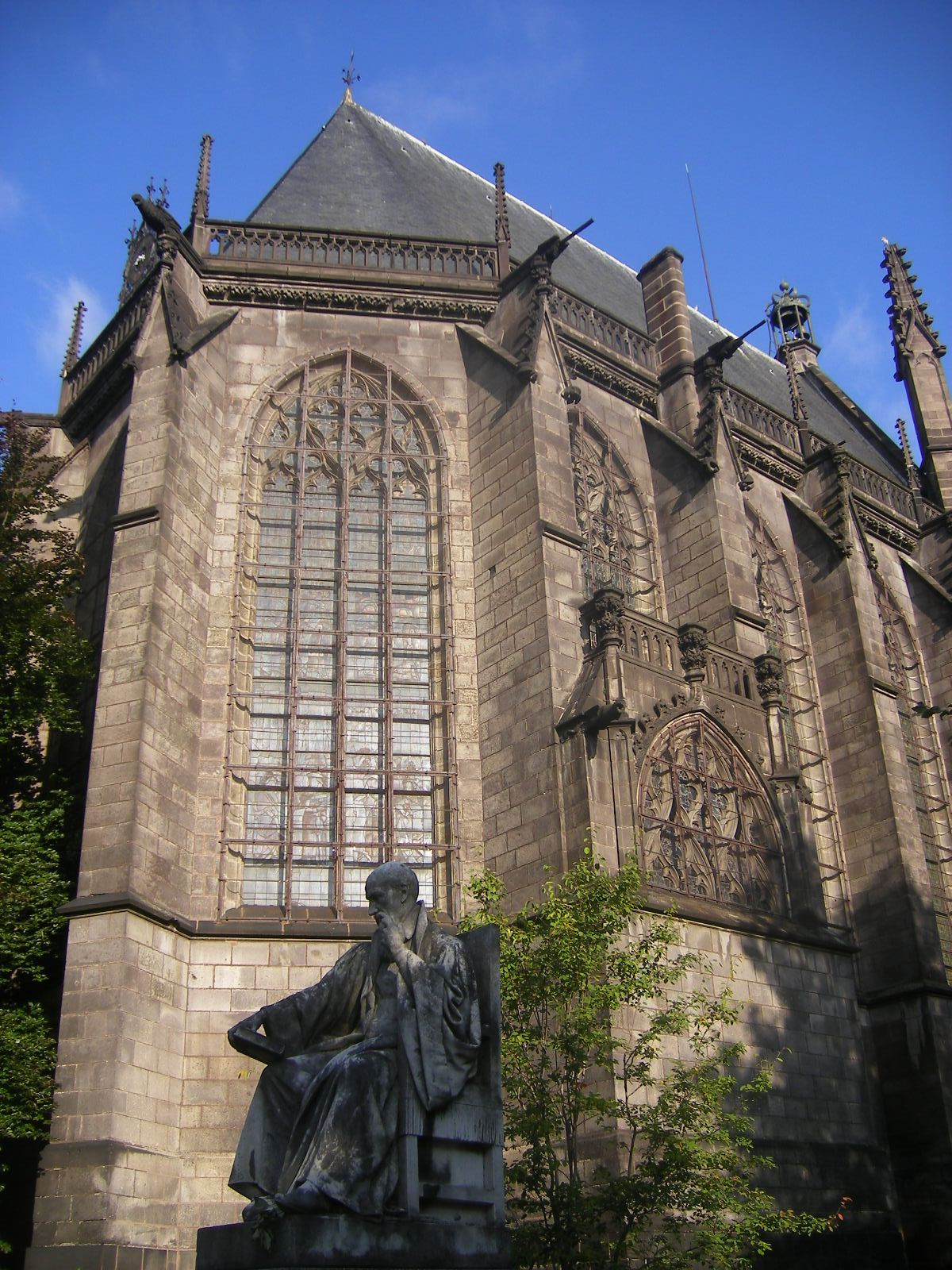 Riom